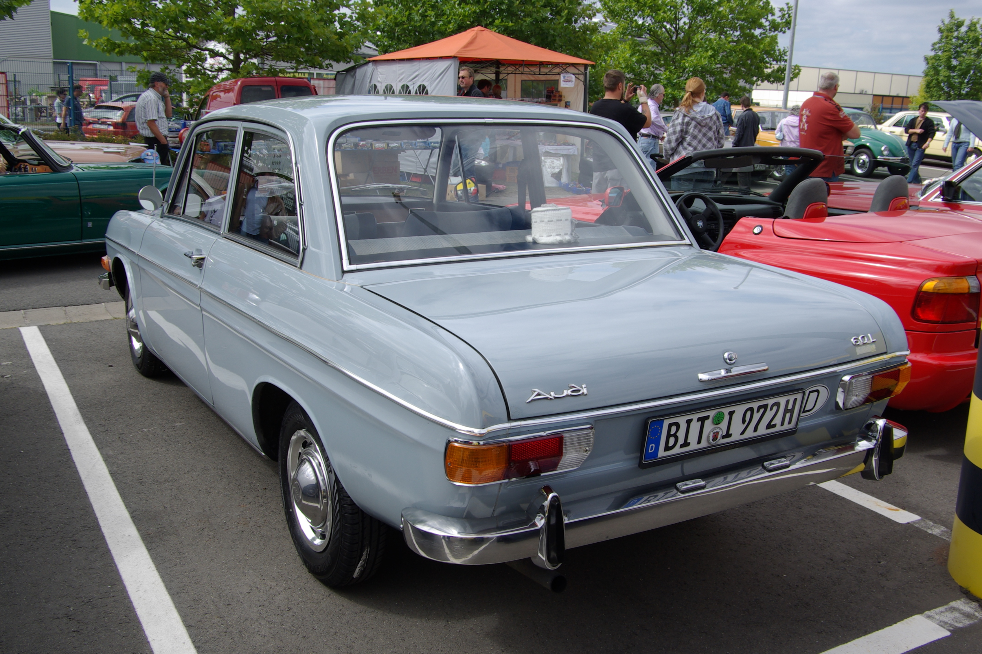 Audi 60 L, Baujahr 1972, 1500 cm³, 4 Zyl., 55 PS, Bitburg Classic 2012